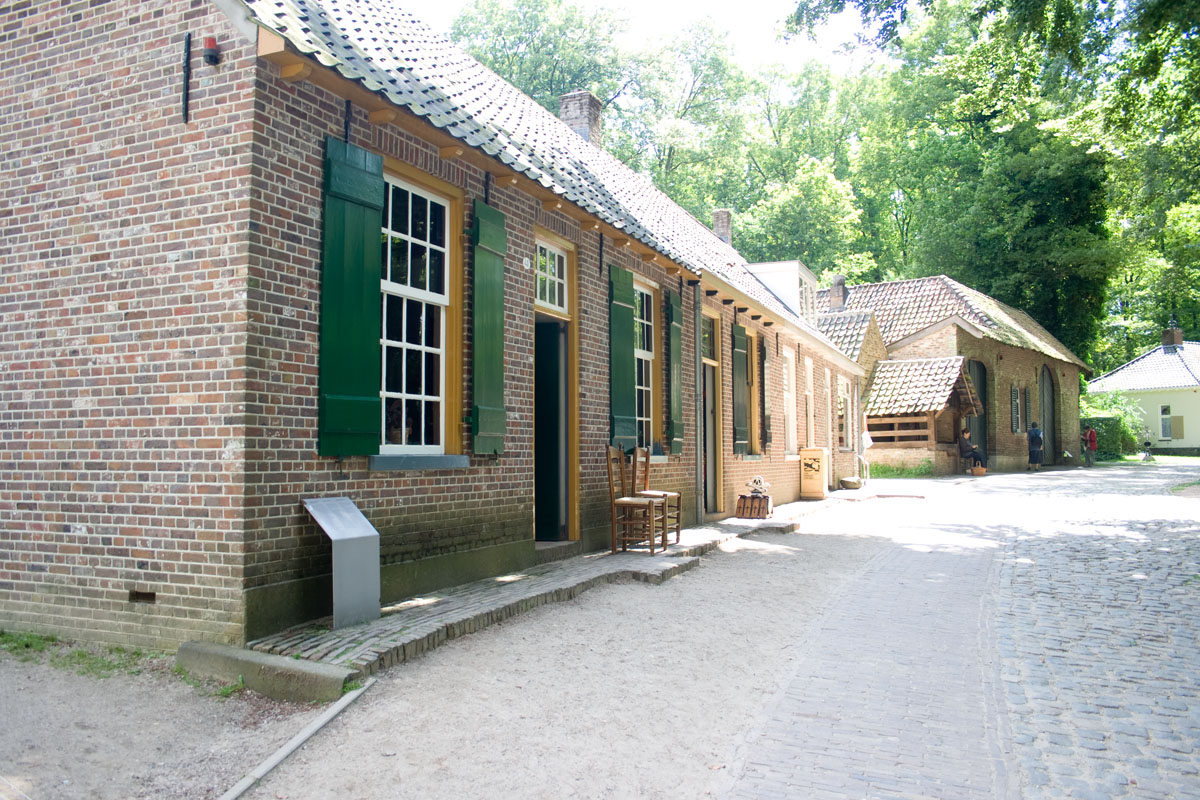 Arbeidershuisjes, Tilburg, 1860, in 1955 naar NOM, thans tijdstraatje 1860-1910-1950-1970, 12.5 191Arbeidershuisjes(tilburg)